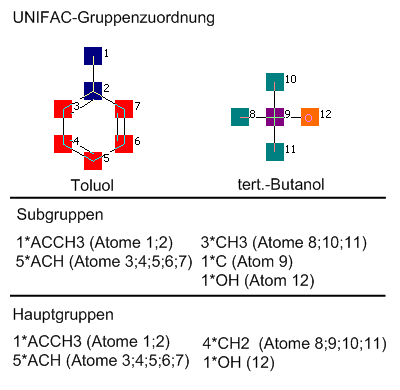 UNlFAC-Grupppenzuordnung (Beispiel)